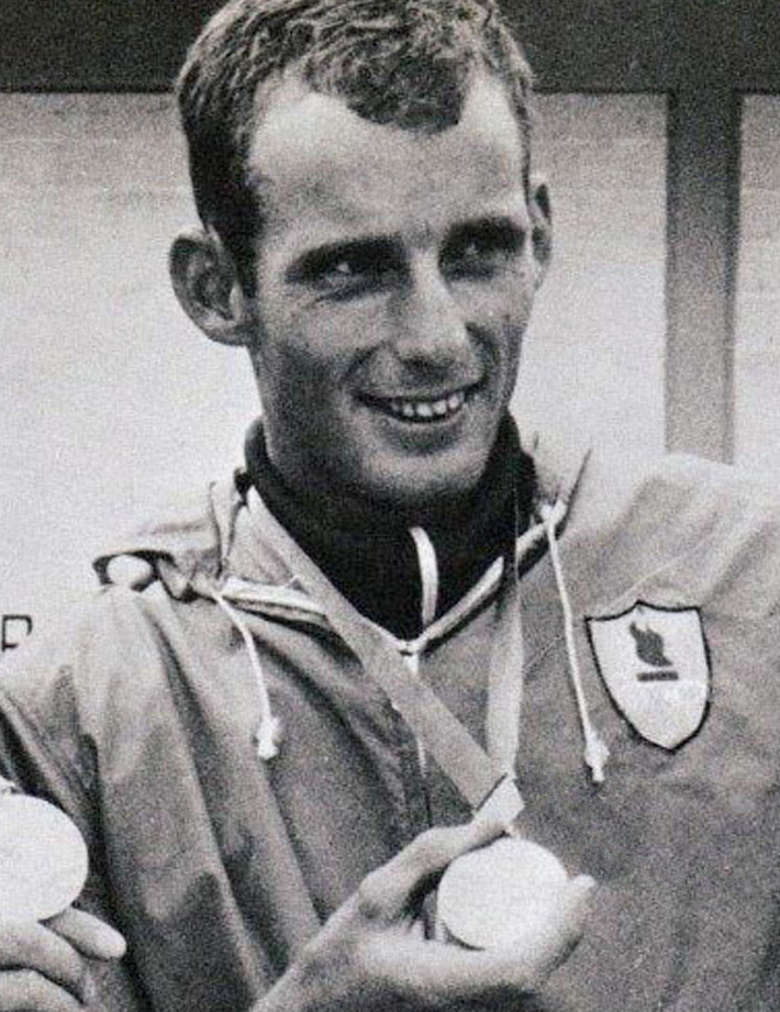 Steinar Amundsen, 1968 Olympics